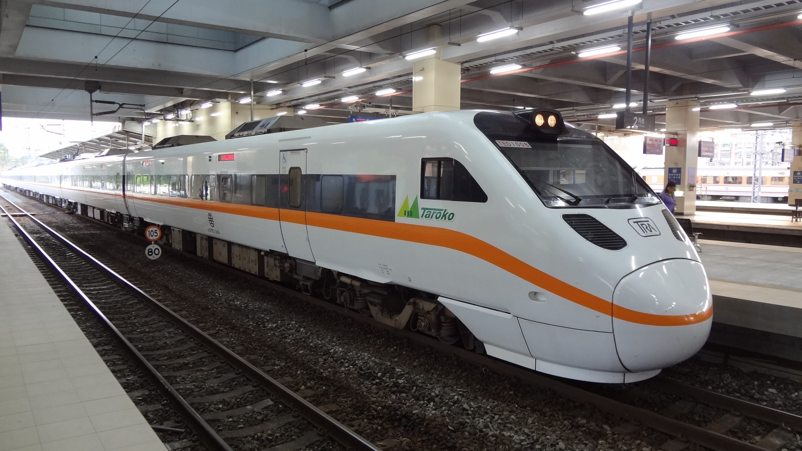 臺灣鐵路管理局TEMU1000型電聯車車頭TED1008停靠七堵車站